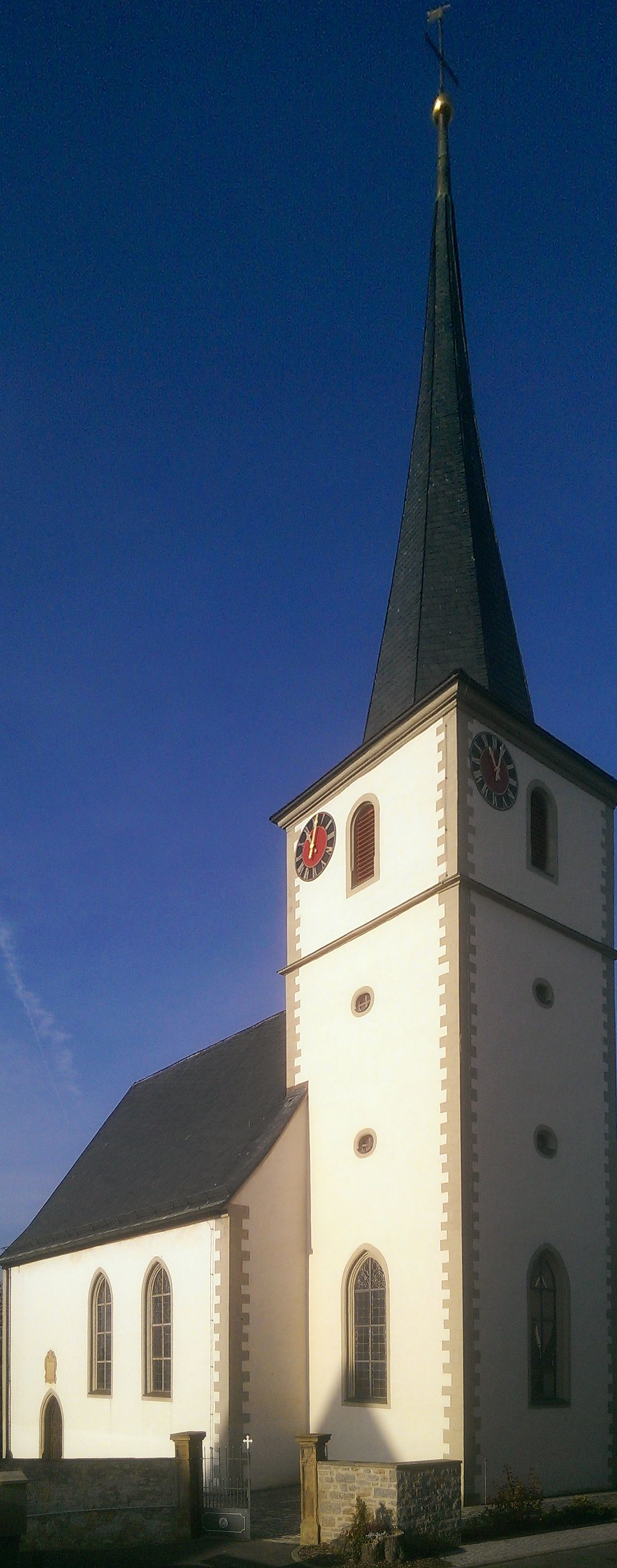 Blick auf das alte Kirchengebäude mit Chorturm